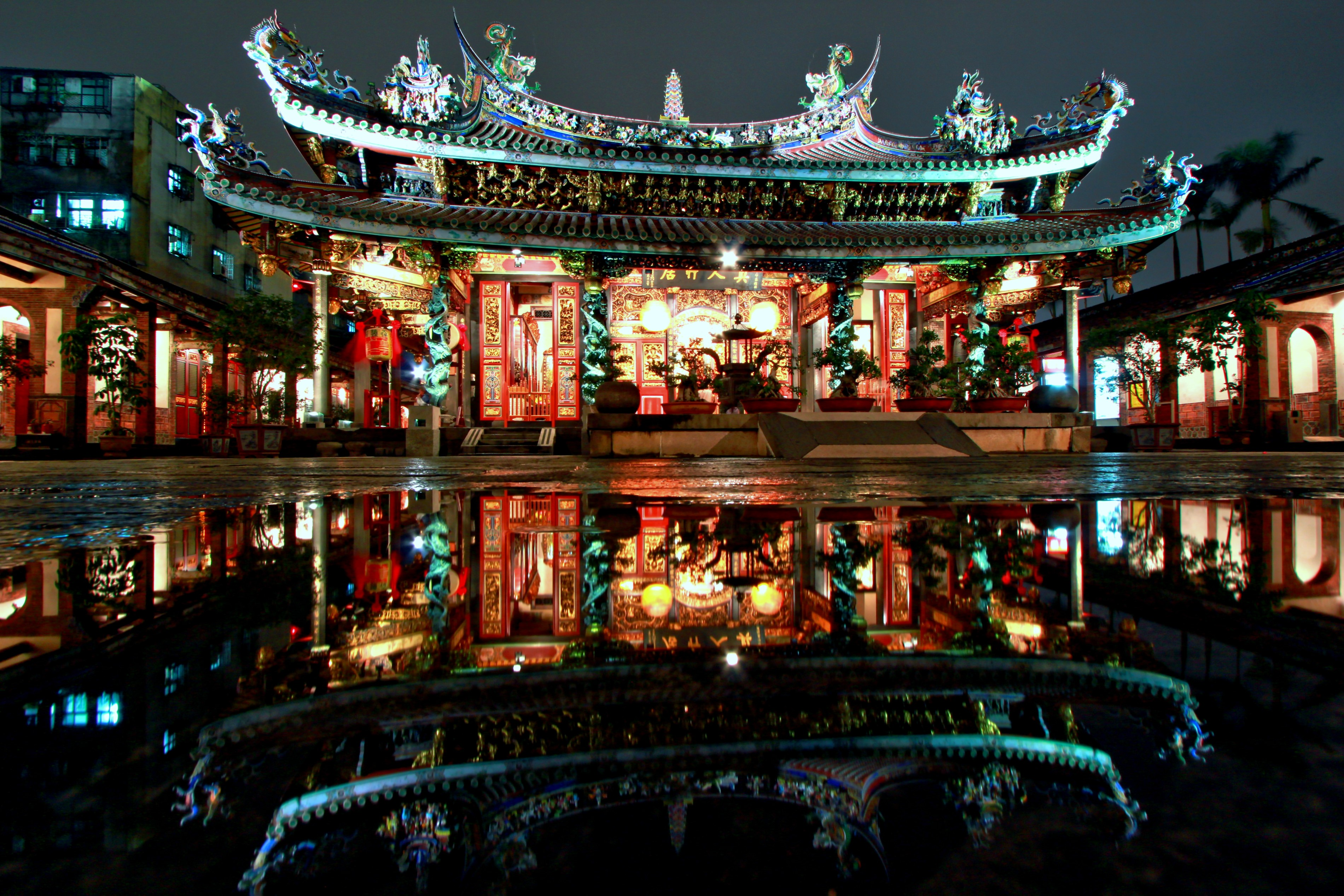 大龍峒保安宮夜景及其水中倒影。